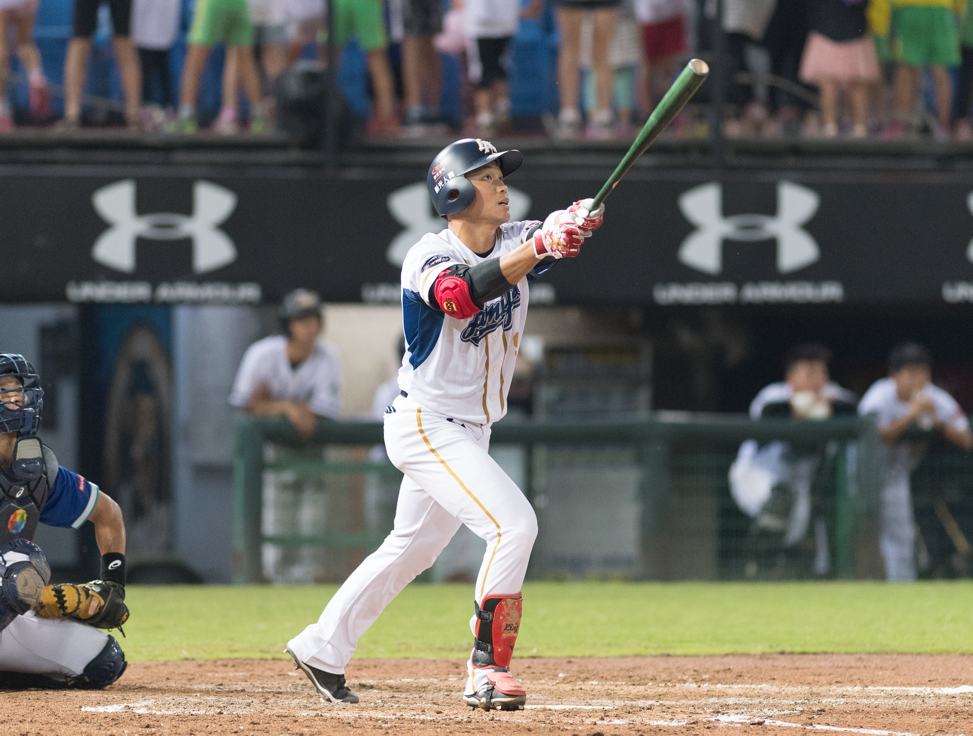 中文（台灣）: 2018.10.5 Lamigo vs. 富邦